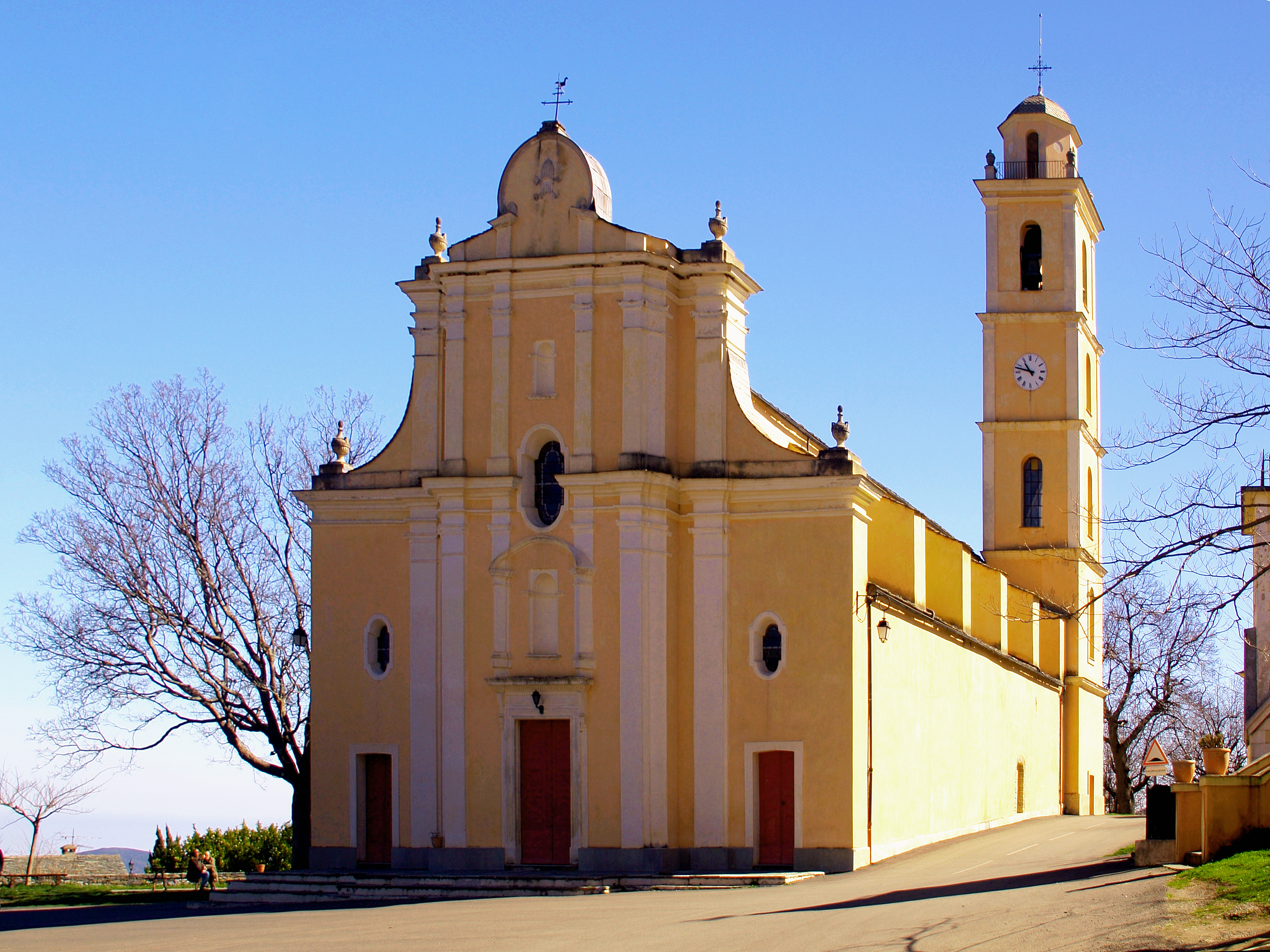 Campile, Castagniccia (Corse) - Église paroissiale Saint-Pierre-Saint-Paul (MH).